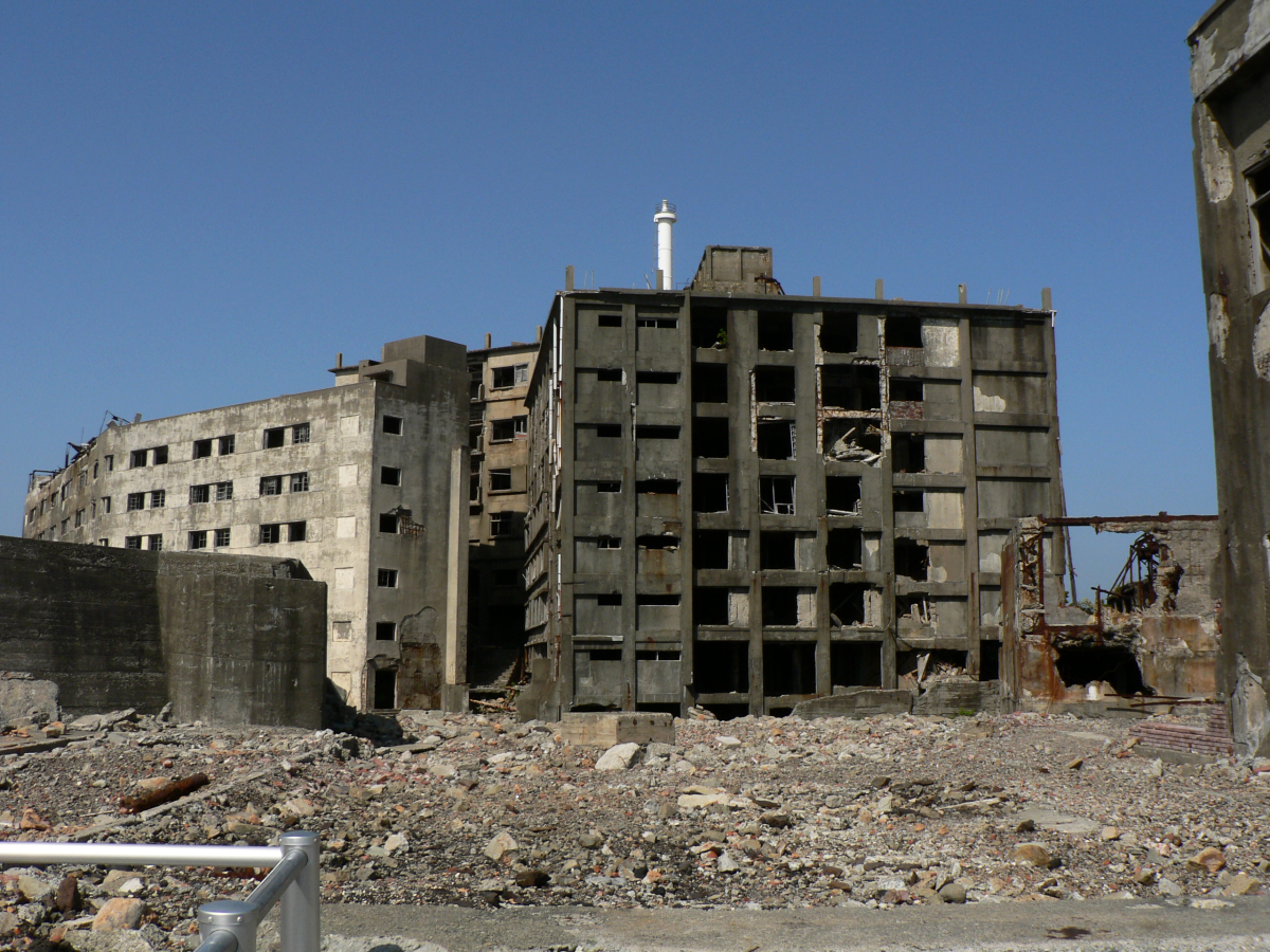 軍艦島の写真。右から仕上工場跡、30号棟(日本初の鉄筋コンクリート造アパート)、31号棟。